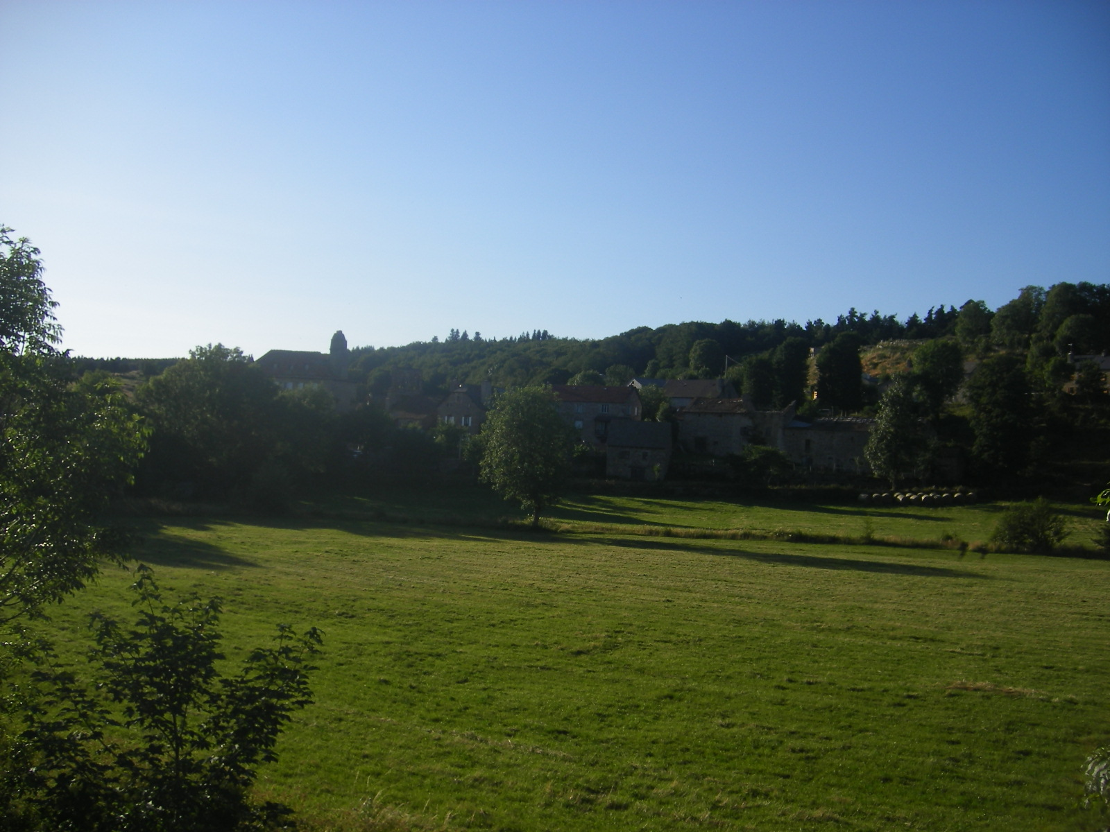 Laubert (Lozère)